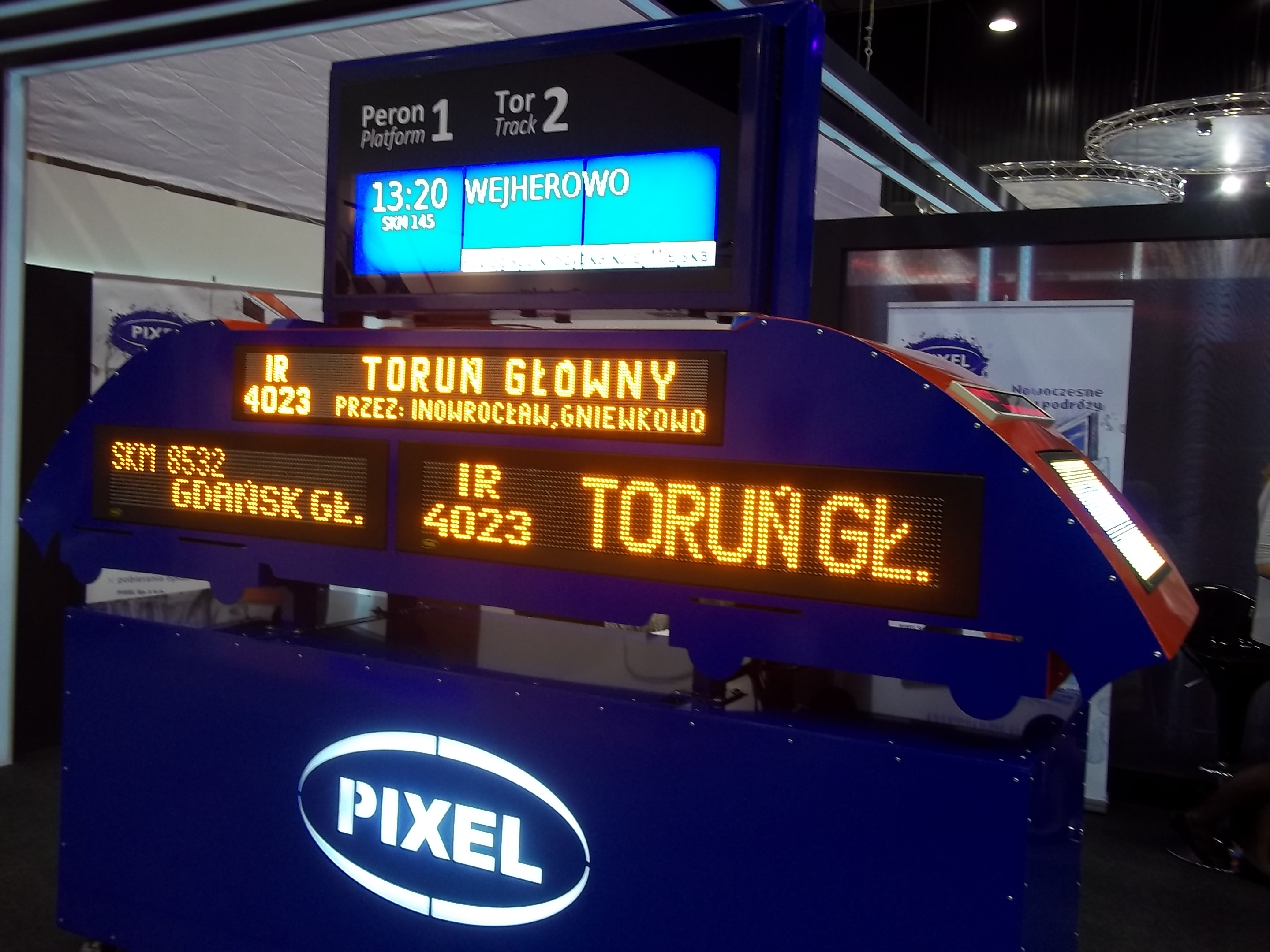 Wyświetlacze informacyjne firmy Pixel zaprezentowane na TRAKO 2013 w Gdańsku.